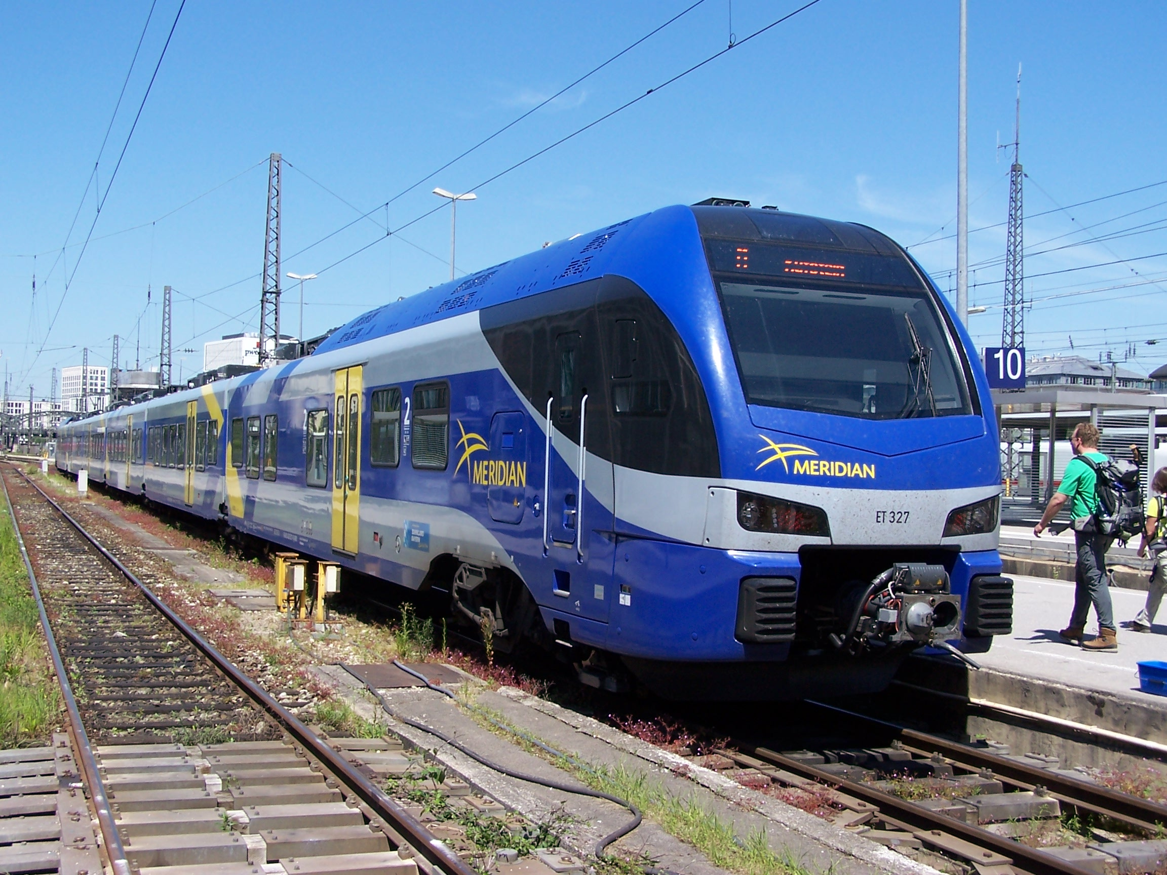 Meridian ET 327 in München Hbf